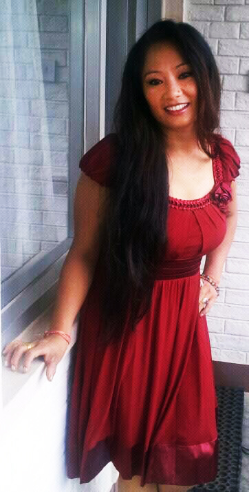 Mausami Gurung